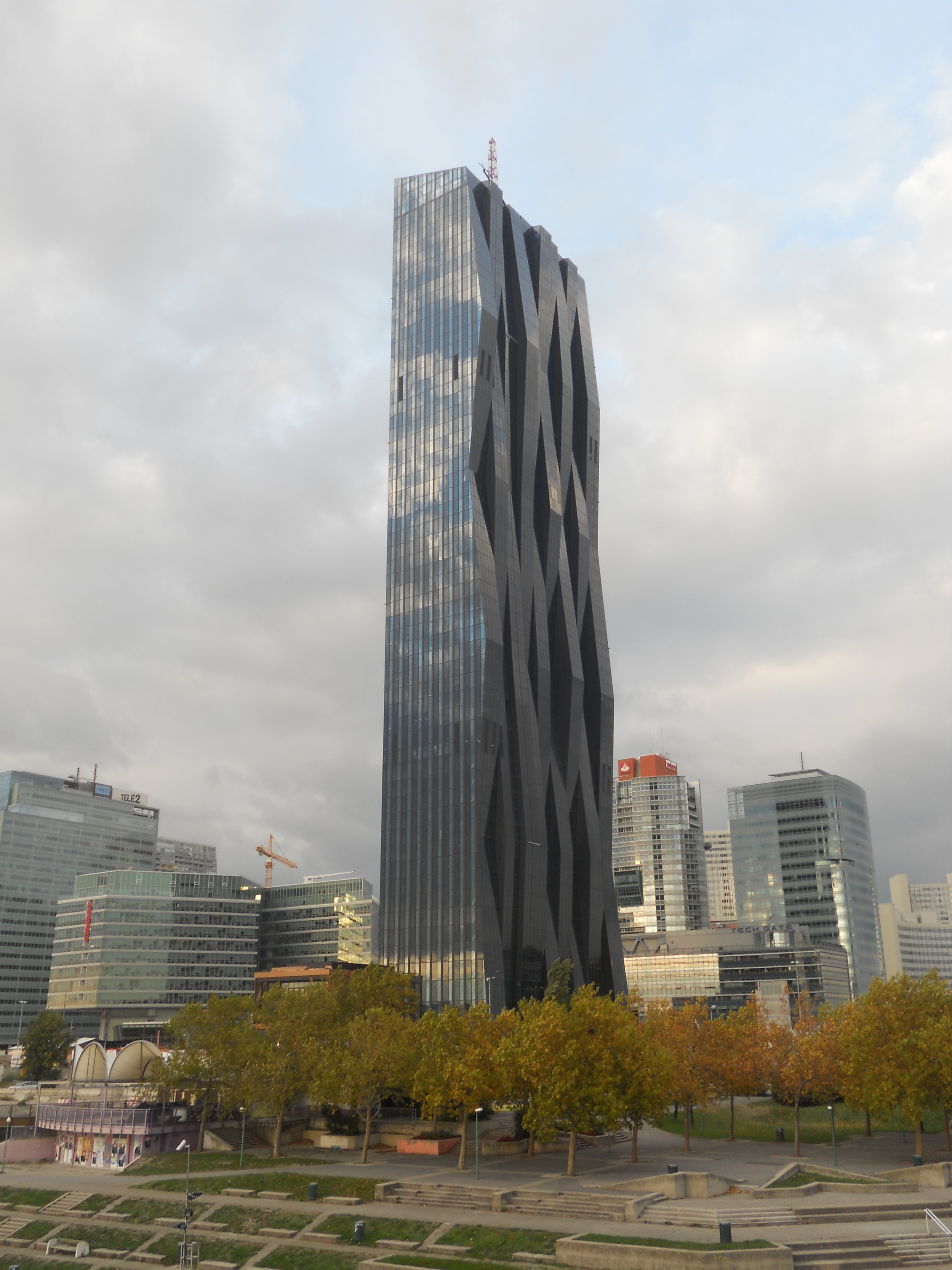 Der Oktober 2013 eröffnete Dc Tower in der Donau-City in Wien